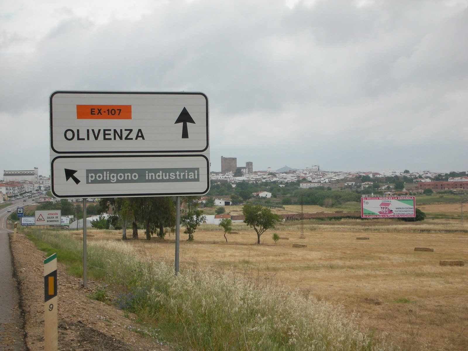 Señal informativa en Olivenza (Badajoz, España).